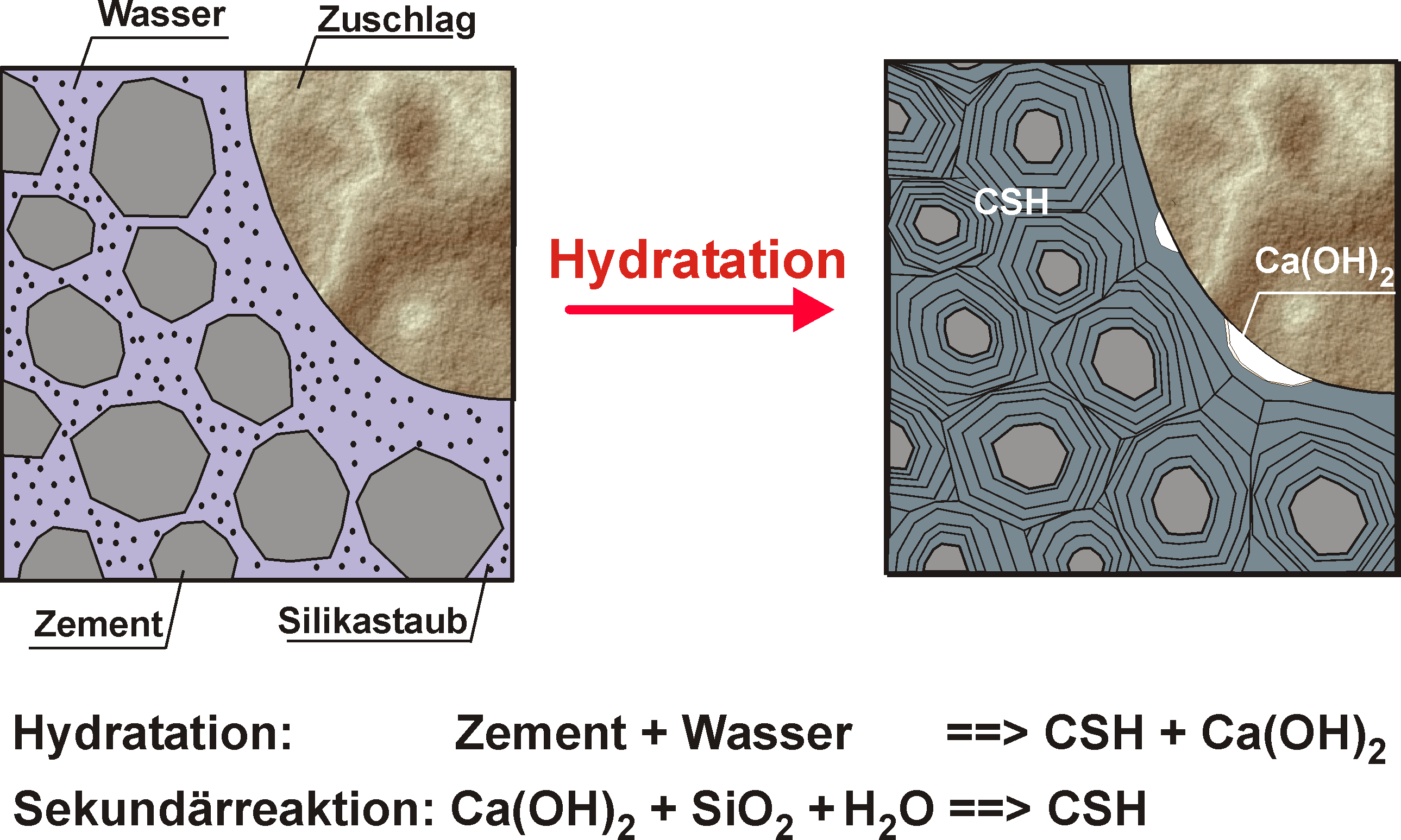 Abbindeverhalten des hochfestens Betons